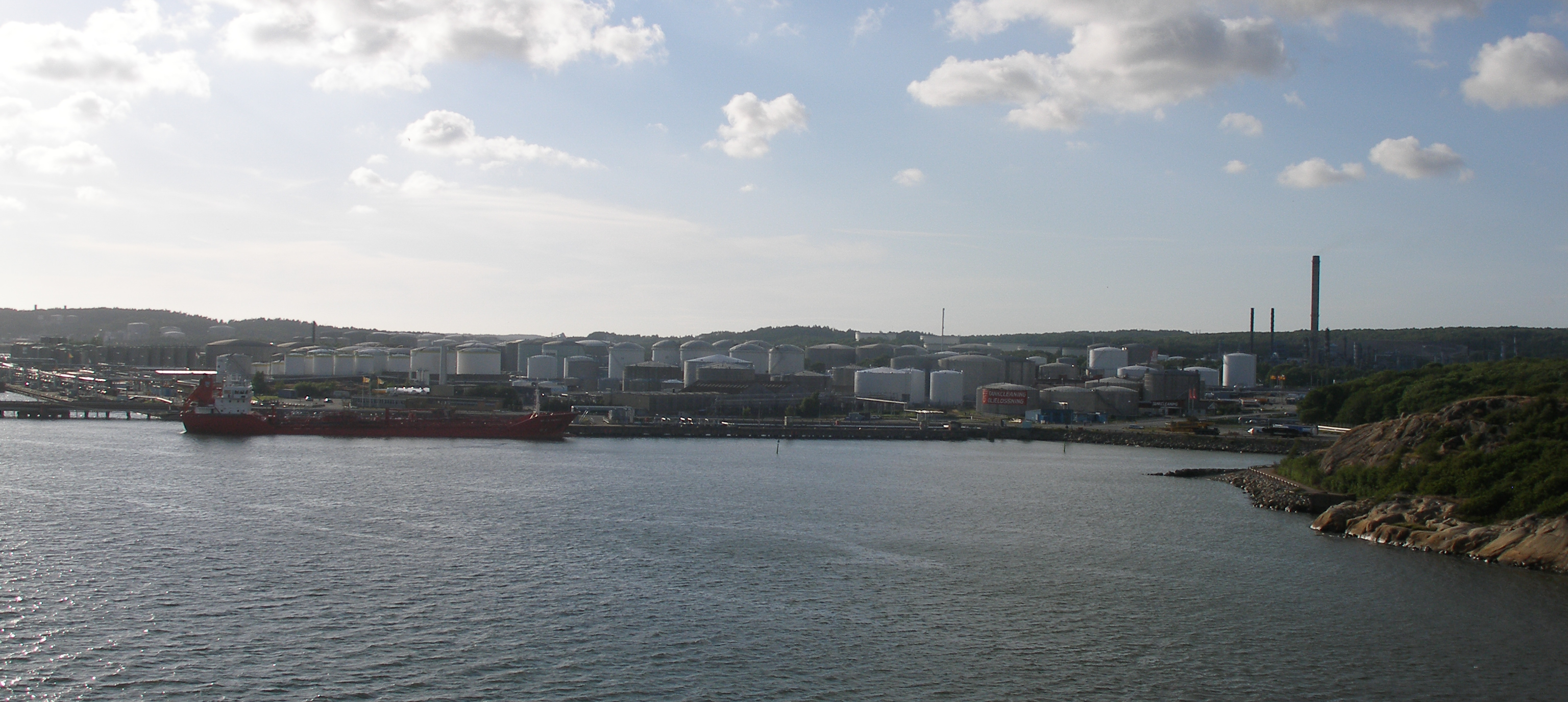 Harbour of Göteborg, Sweden.